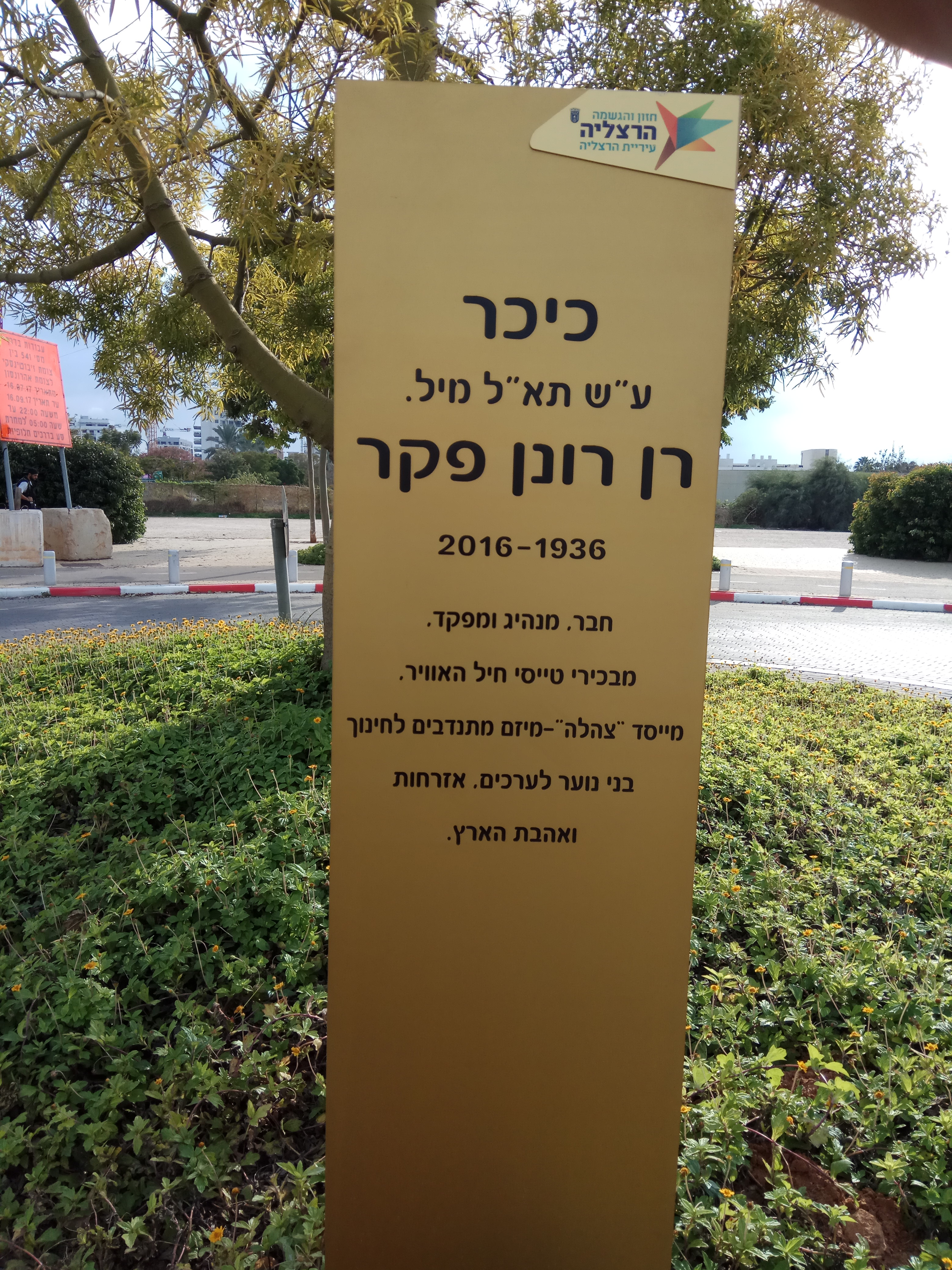 כיכר רן פקר בהרצליה